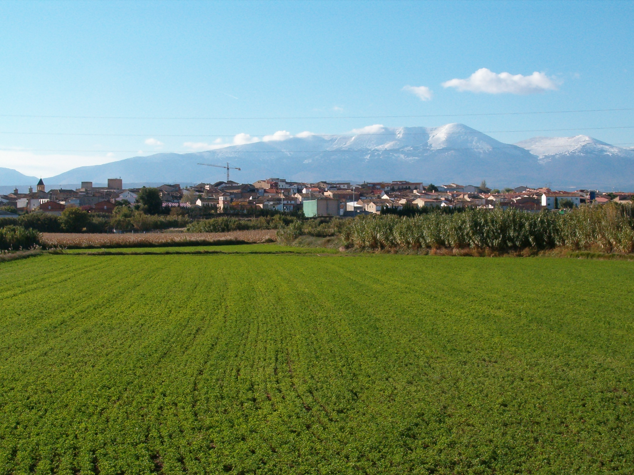 Novallas con el Moncayo al fondo